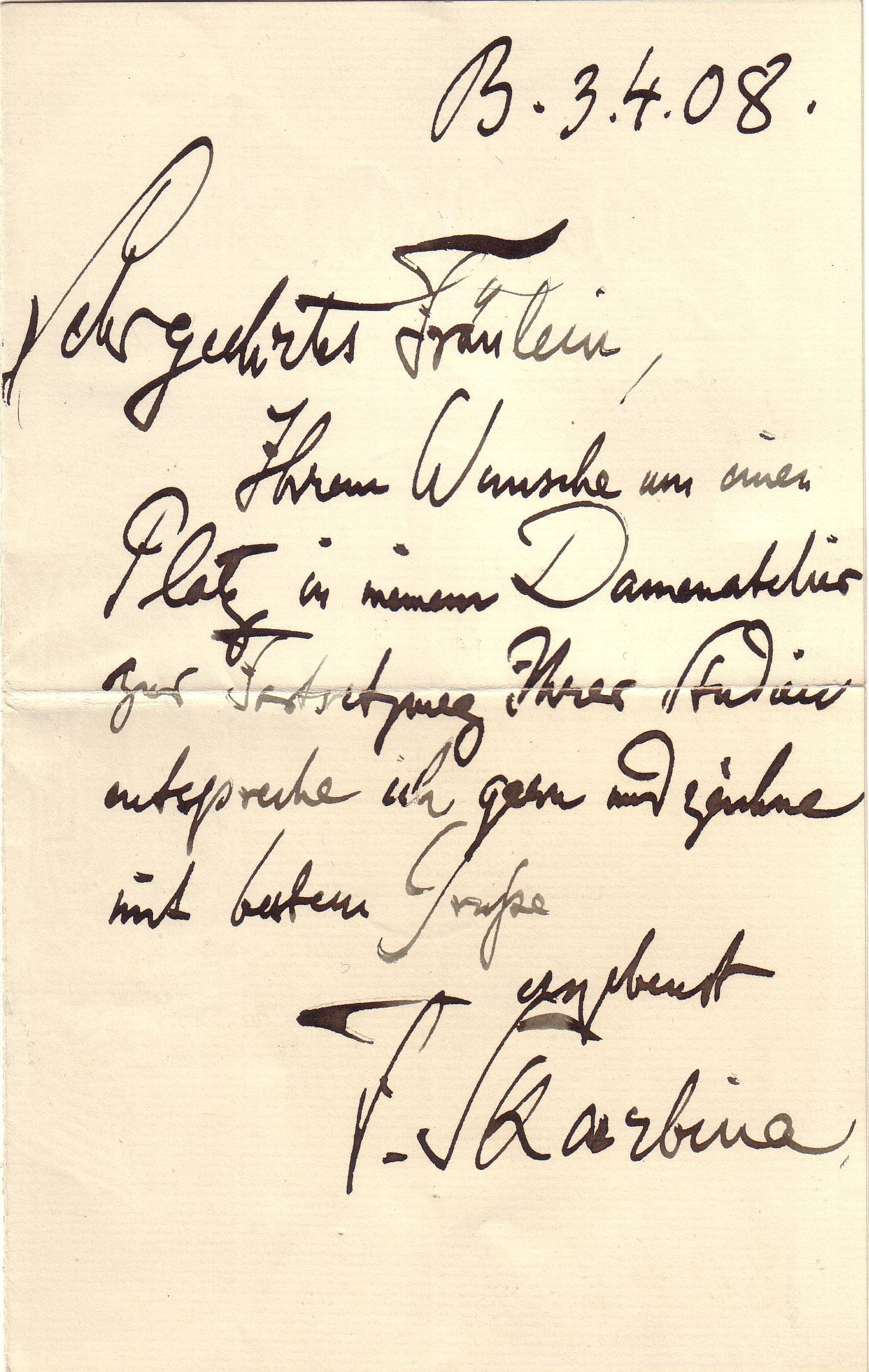 Schreiben von Prof. Franz Skarbina (1908)